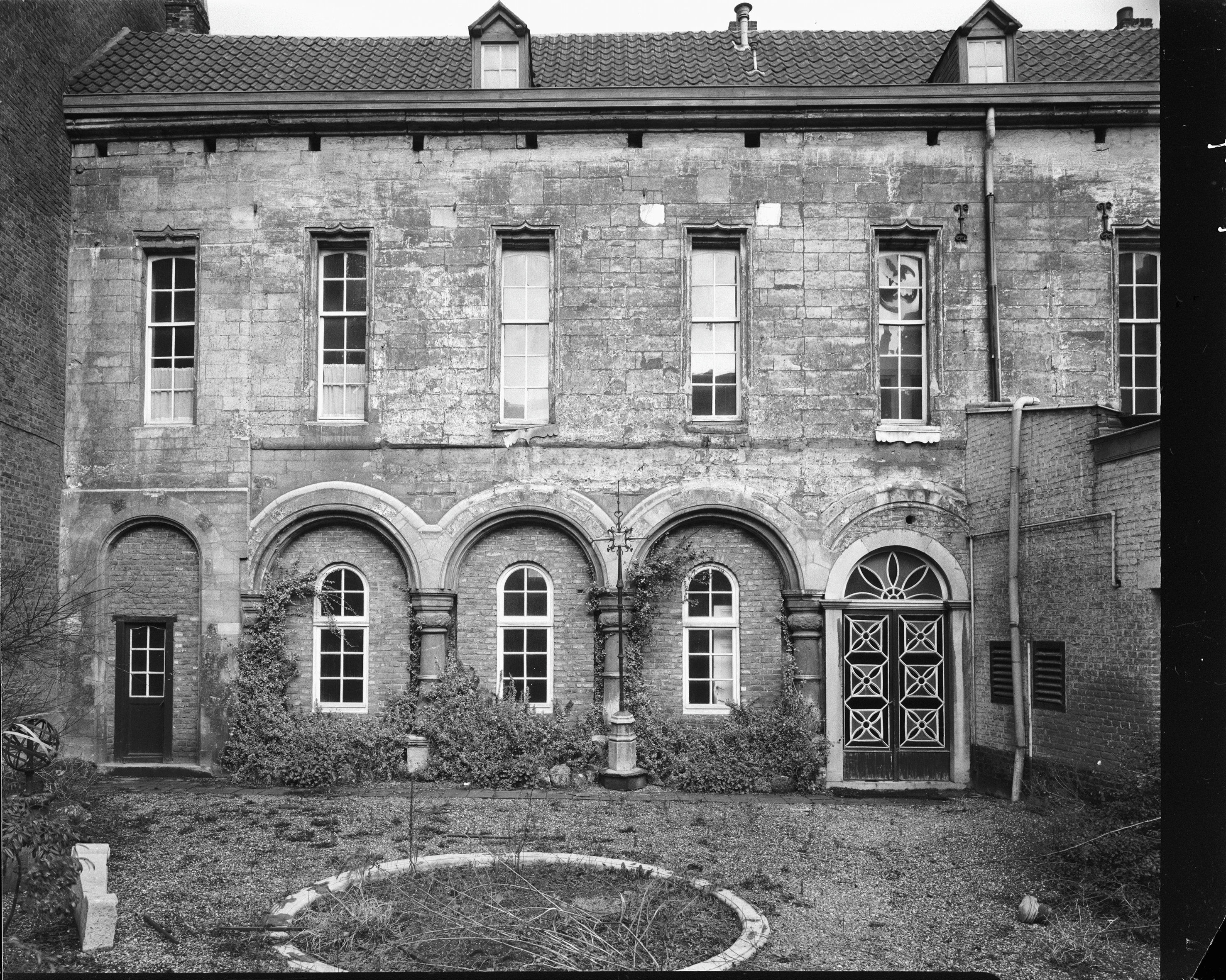 Spaans Gouvernement: Achtergevel, met dichtgezette arcade